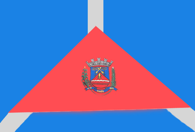 Bandeira do município de Sengés, Paraná, Brasil.